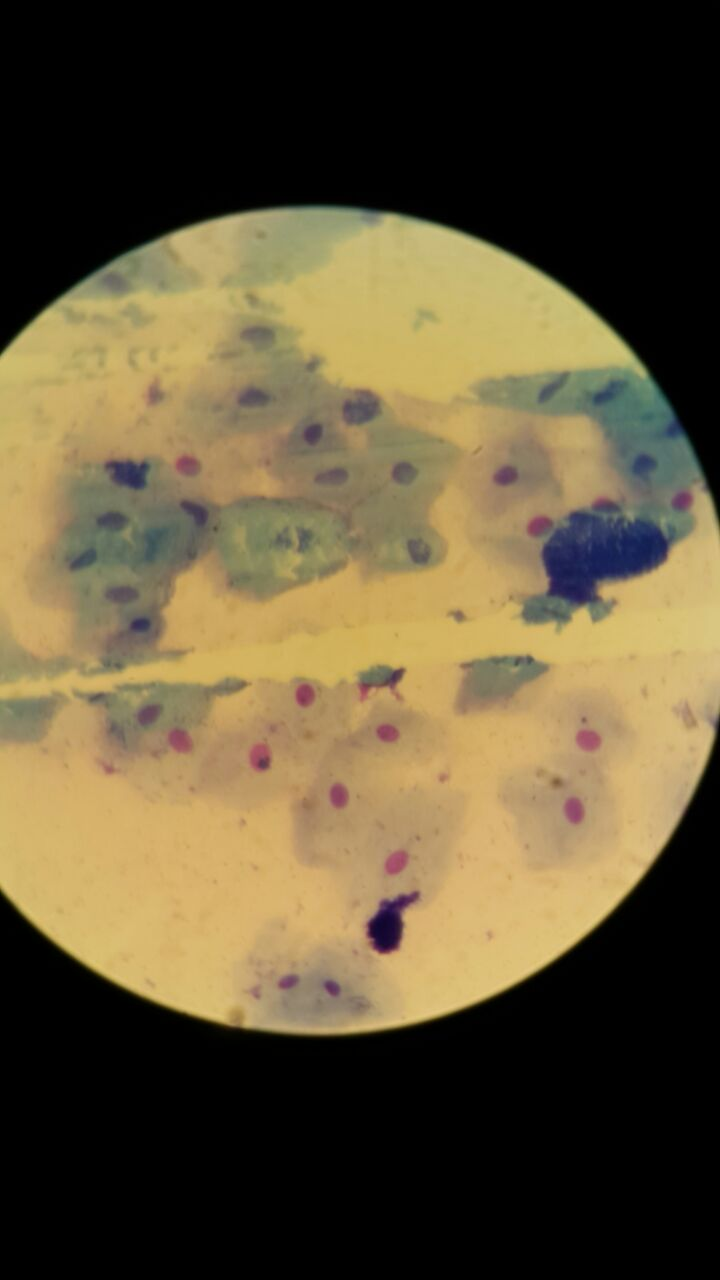 Células bucales bajo tinción de Giemsa observada en el laboratorio de química del Tecnológico de Monterrey Campus Ciudad de México.